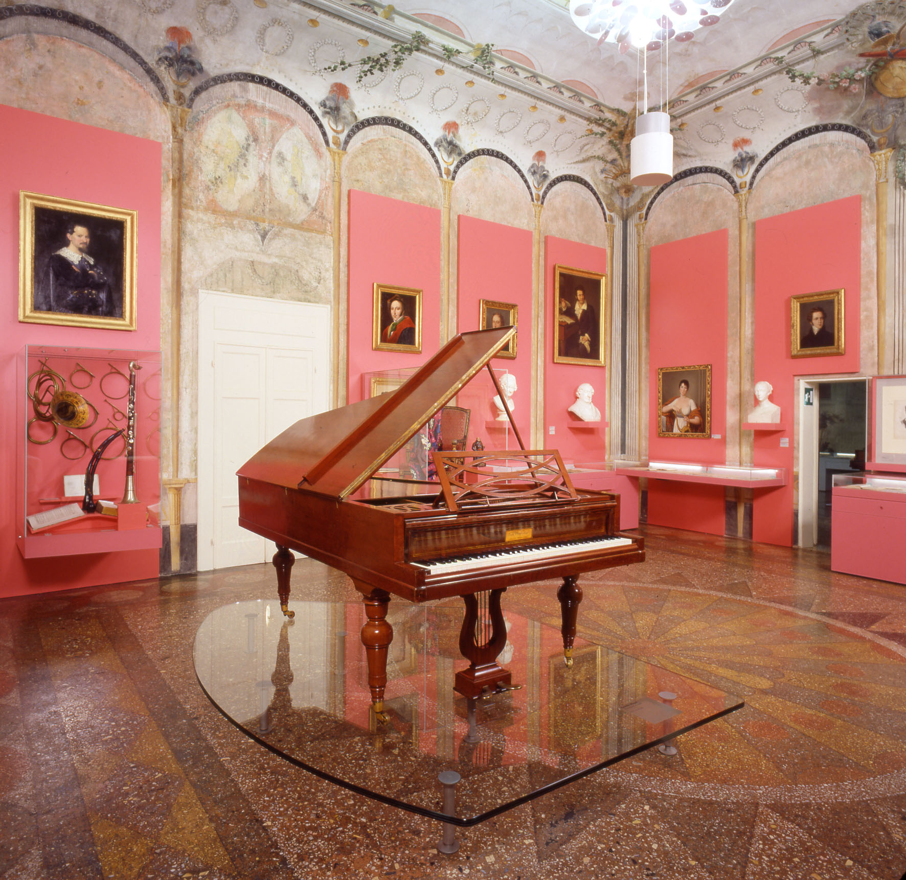 Enrico Tabellini-Museo della musica, 10-03-09, Sala 7 del Museo internazionale e biblioteca della musica di Bologna